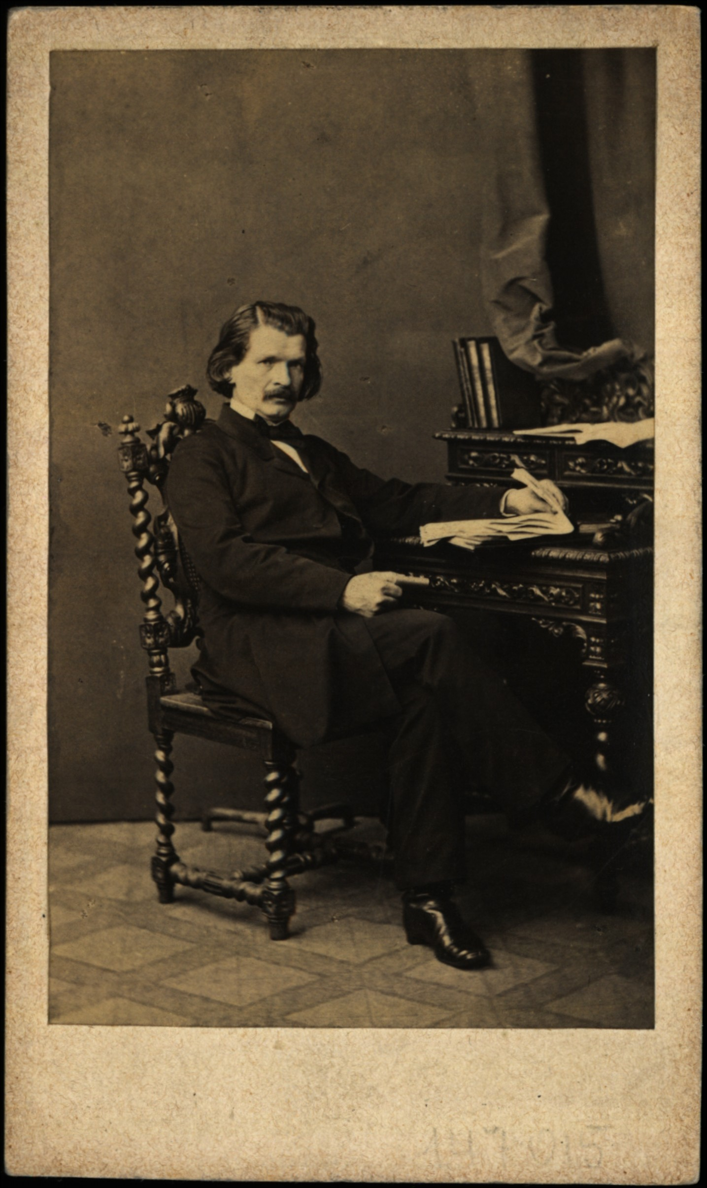 Władysław Niegolewski, ok. 1860 r.